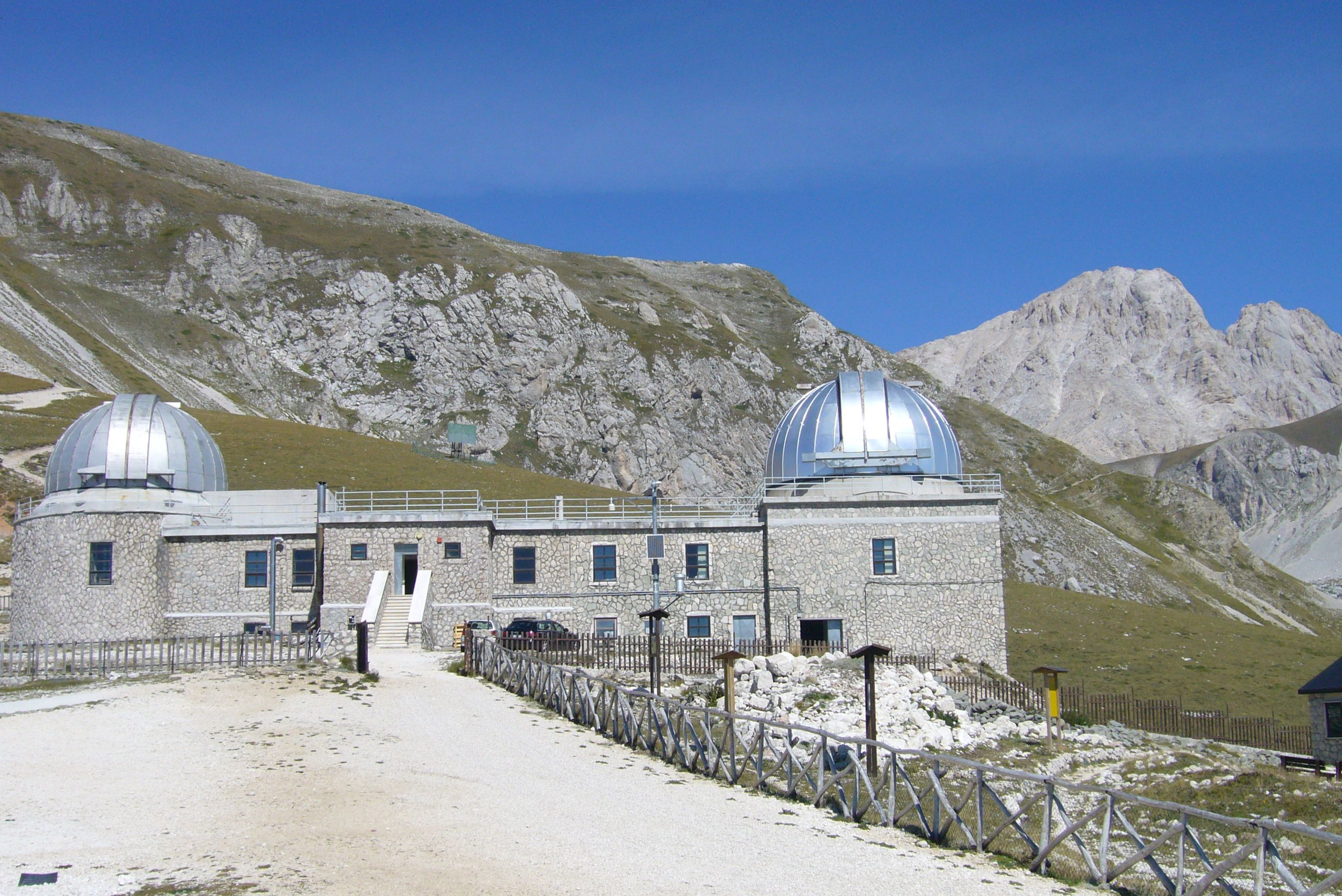 L'Osservatorio con dietro il Corno Grande